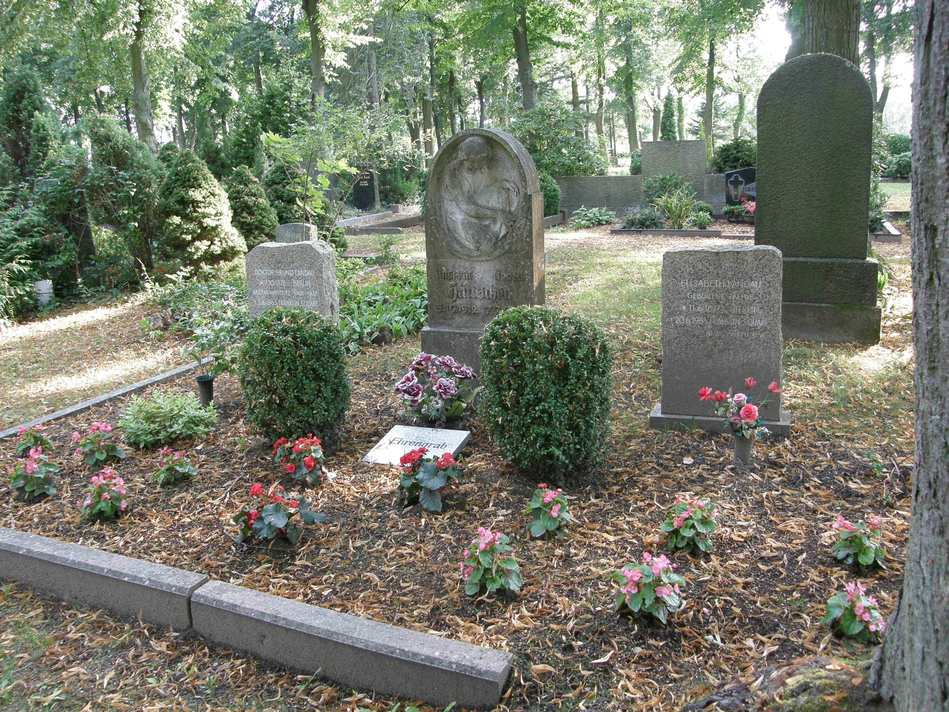 Kommunalfriedhof Wandlitz, Ortsteil Wandlitz (Dorf); Ehrengrab Landau